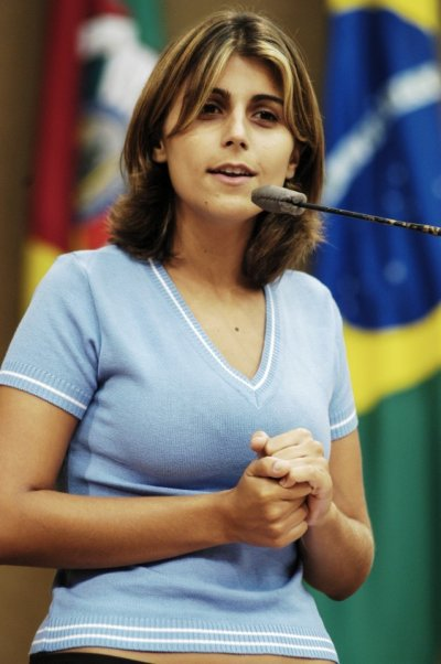 Manuela d'Ávila in 2004.